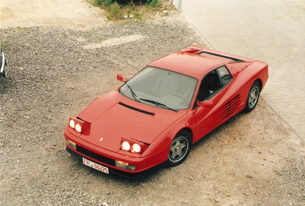 Ferrari Testarossa 1988, Neuwagen Import aus Italien, in Deutschland war kein Fzg. zu bekommen. (Foto 1988)